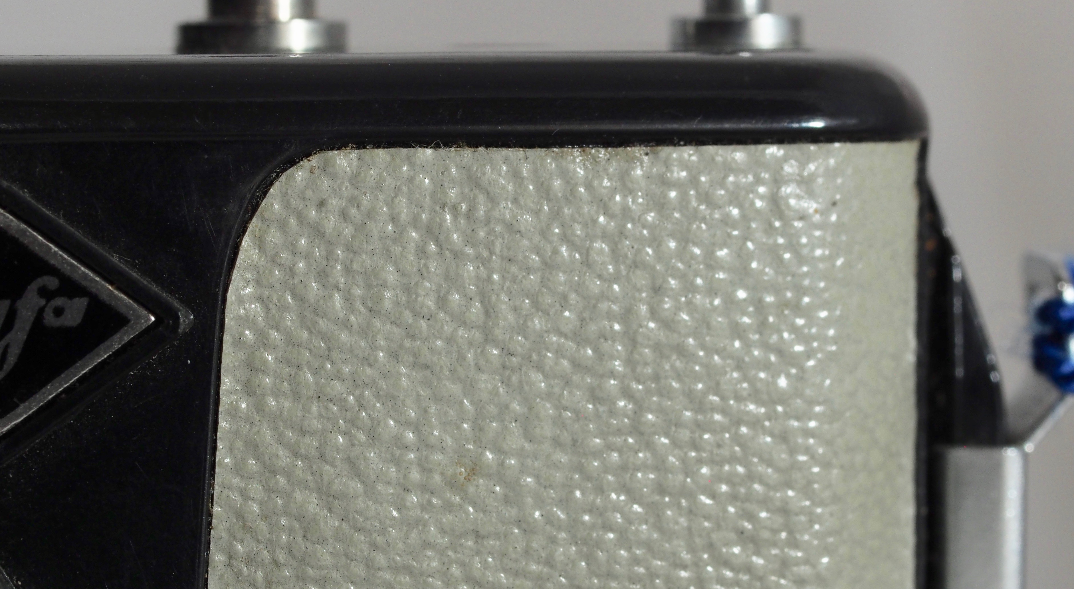 Click Oberfläche Leder grau